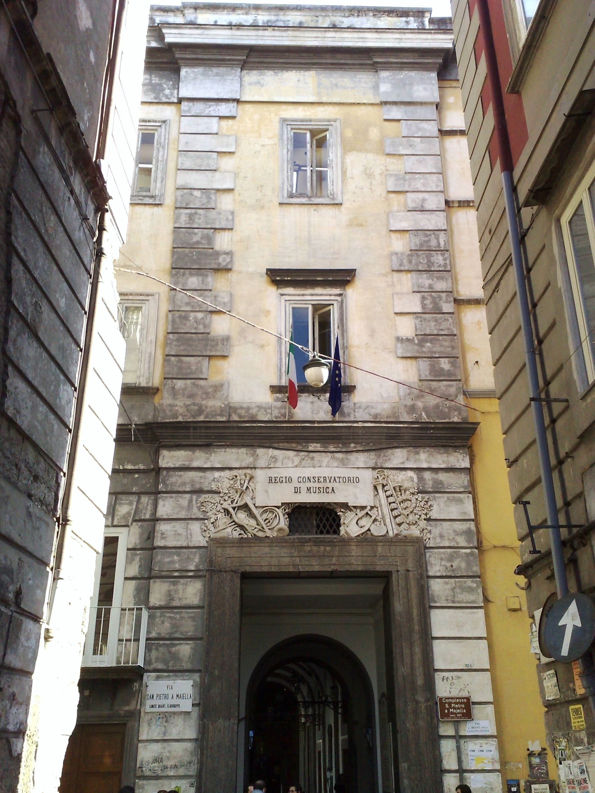 Facciata del Conservatorio di Napoli San Pietro a Majella.